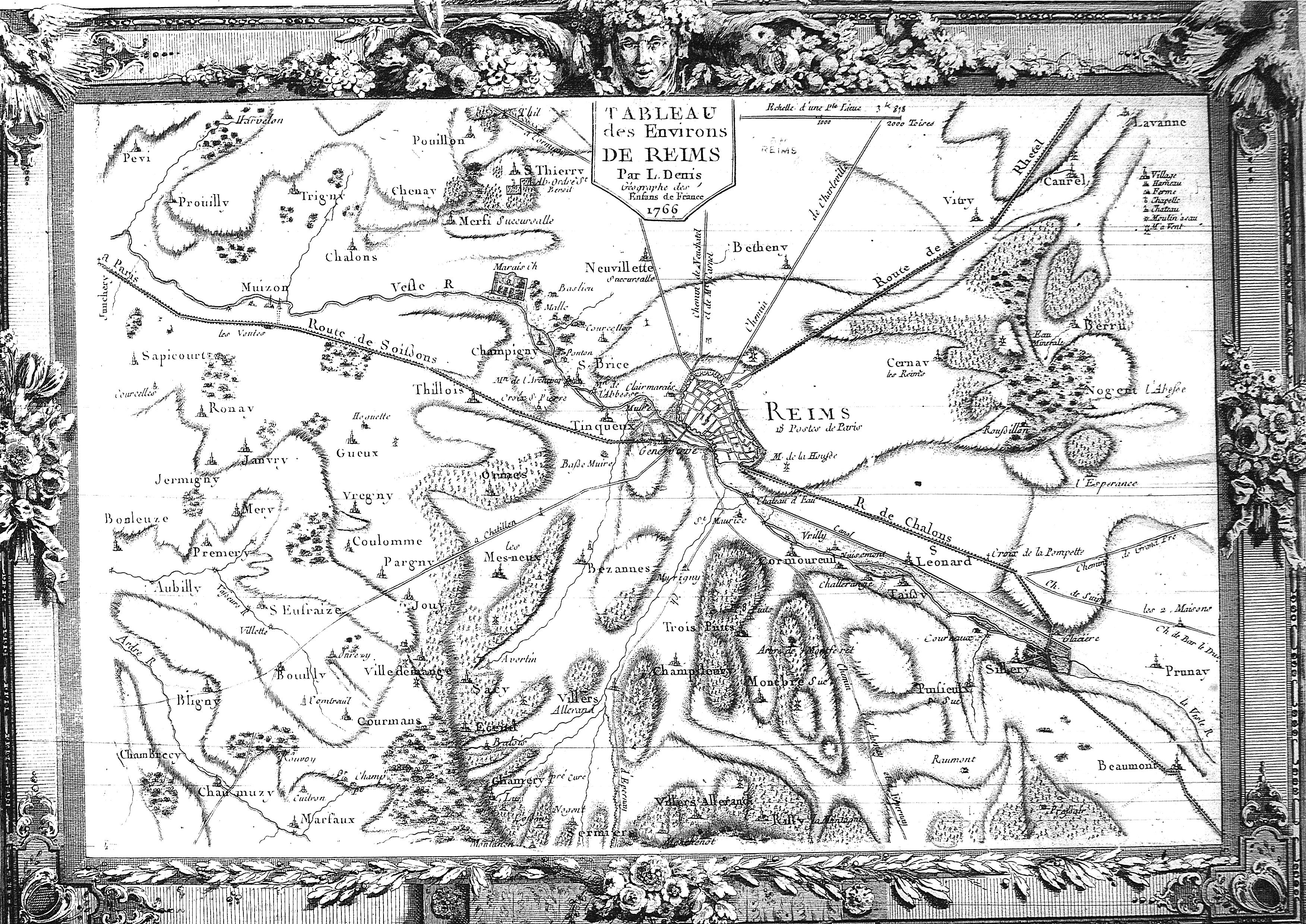 carte ancienne de Reims. côte BM Reims Xxiv iii a.